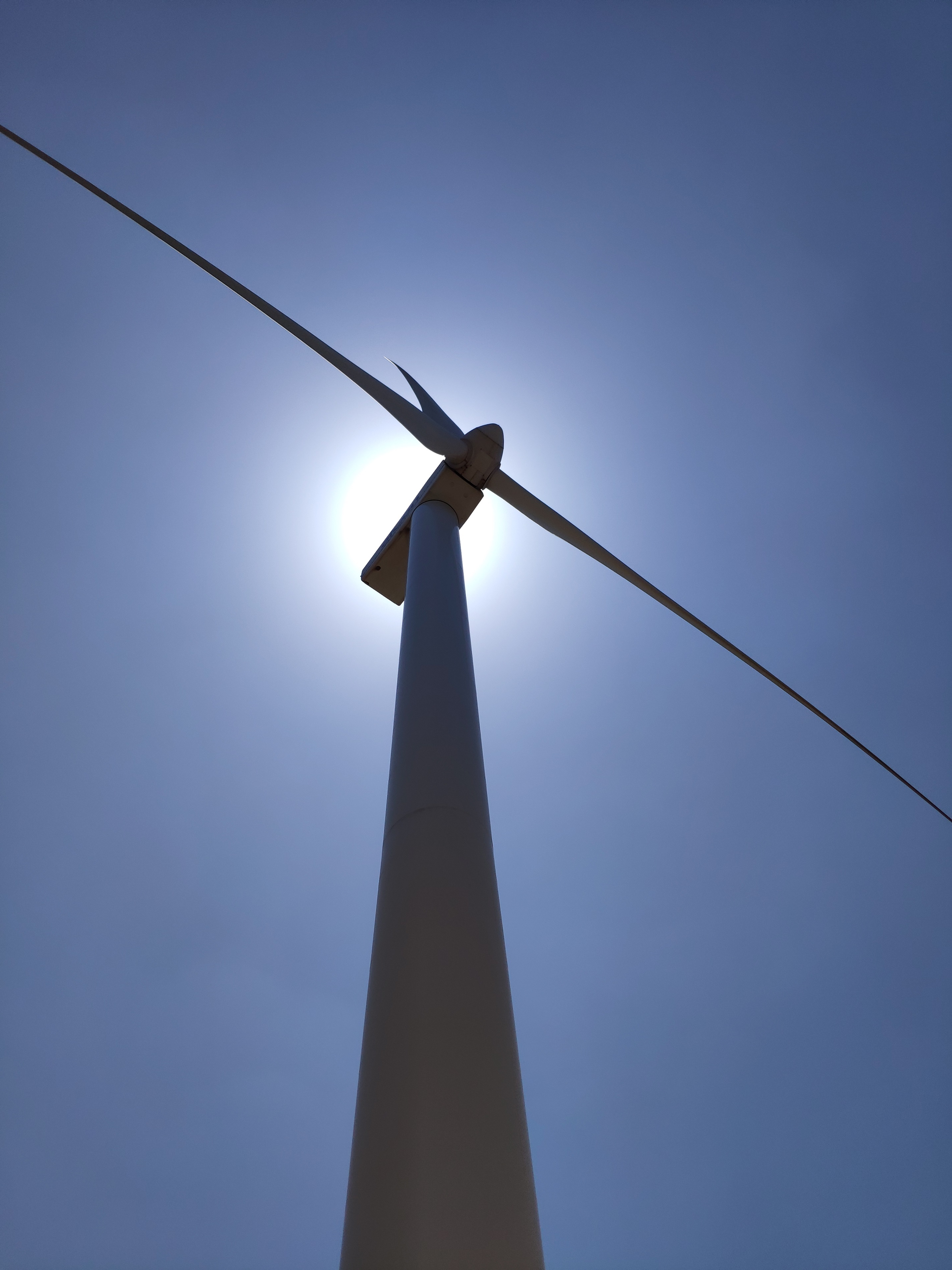 תקריב על אחת הטורבינות בגלבוע